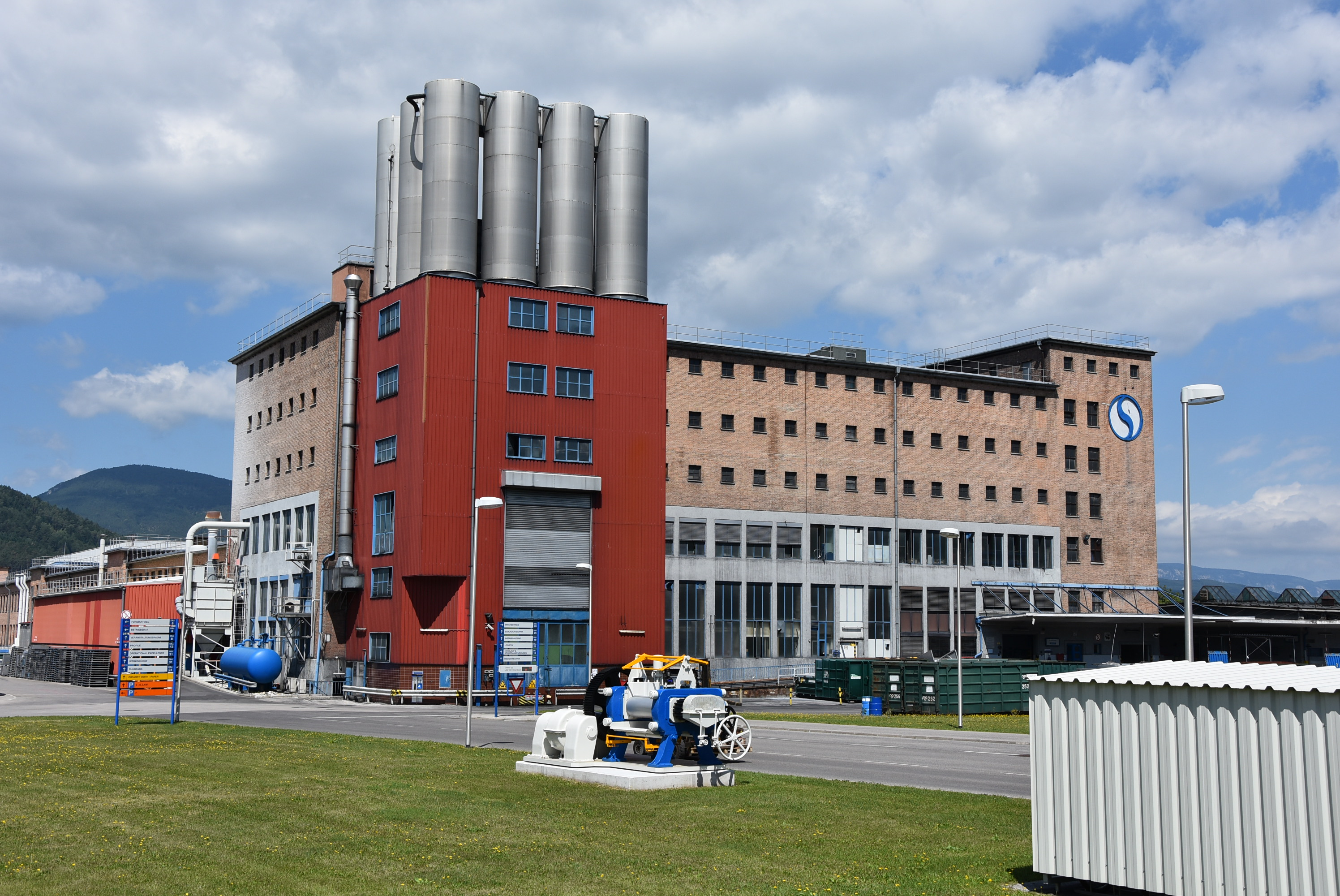 Firmengebäude der Semperit AG in Wimpassing im Schwarzatale